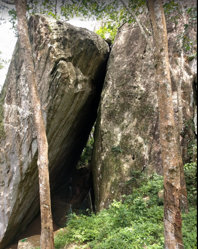 සිංහල: දොරවක ලෙන